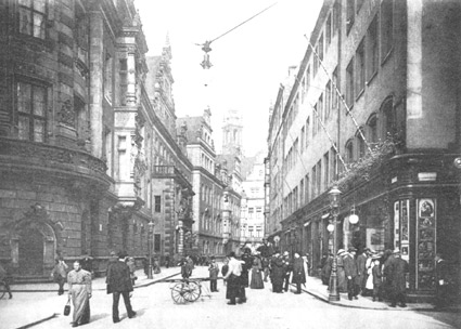 Galerie Ernst Arnold um 1905 an der Schloßstraße Ecke Sporergasse in Dresden